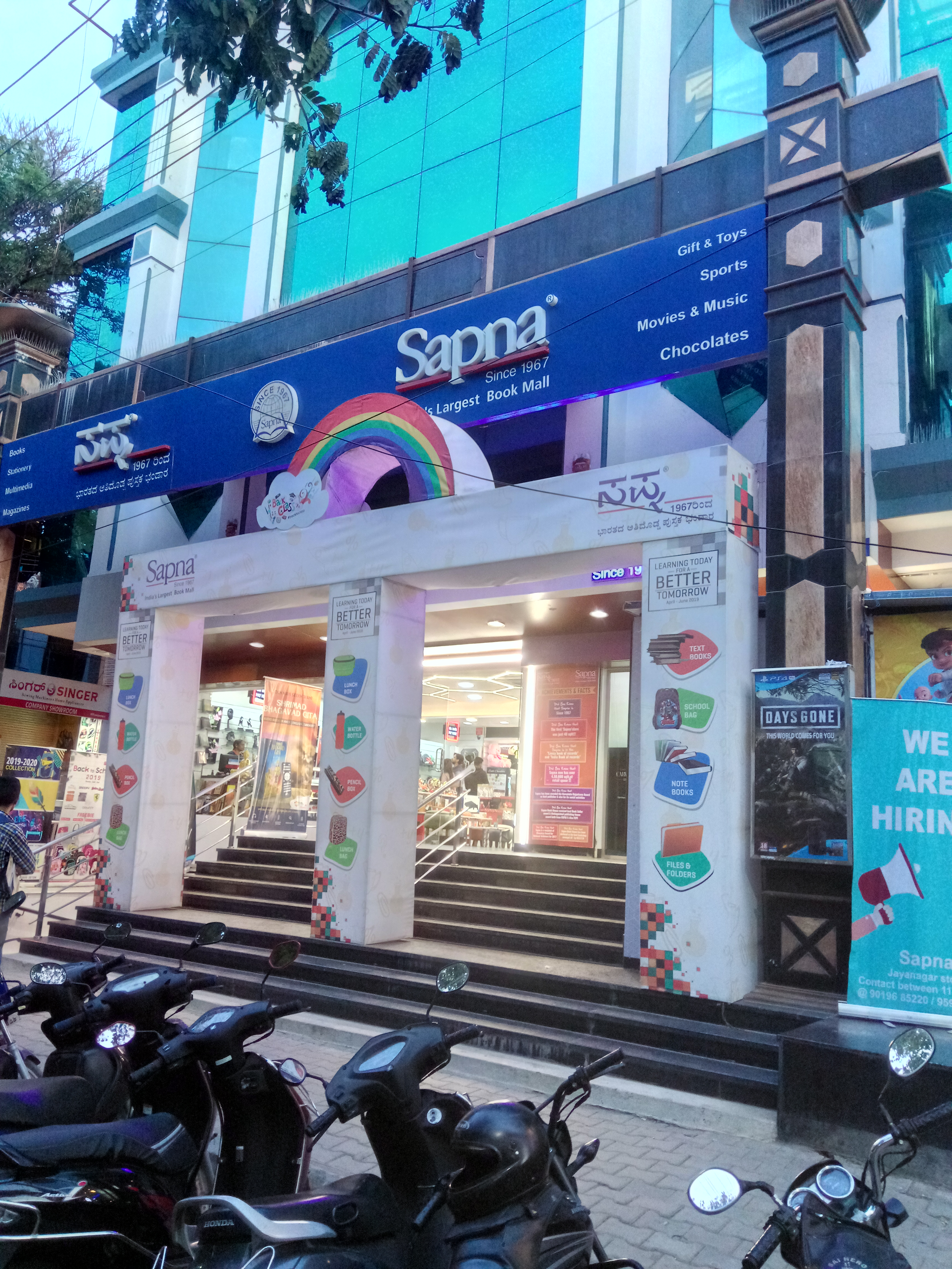 Sapna Book House, No. 14, 27th Cross Rd, 4th Block, Jayanagar, Bengaluru, Karnataka 560011